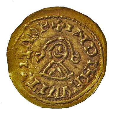 Triente de ouro procedente da ceca bracarense, Gallaecia, na que se representa a Witiza como rei.